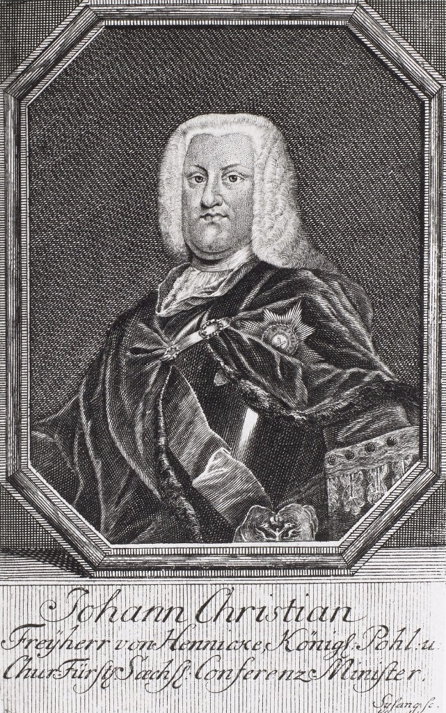 Johann Christian von Hennicke, zeitgenössischer Stich